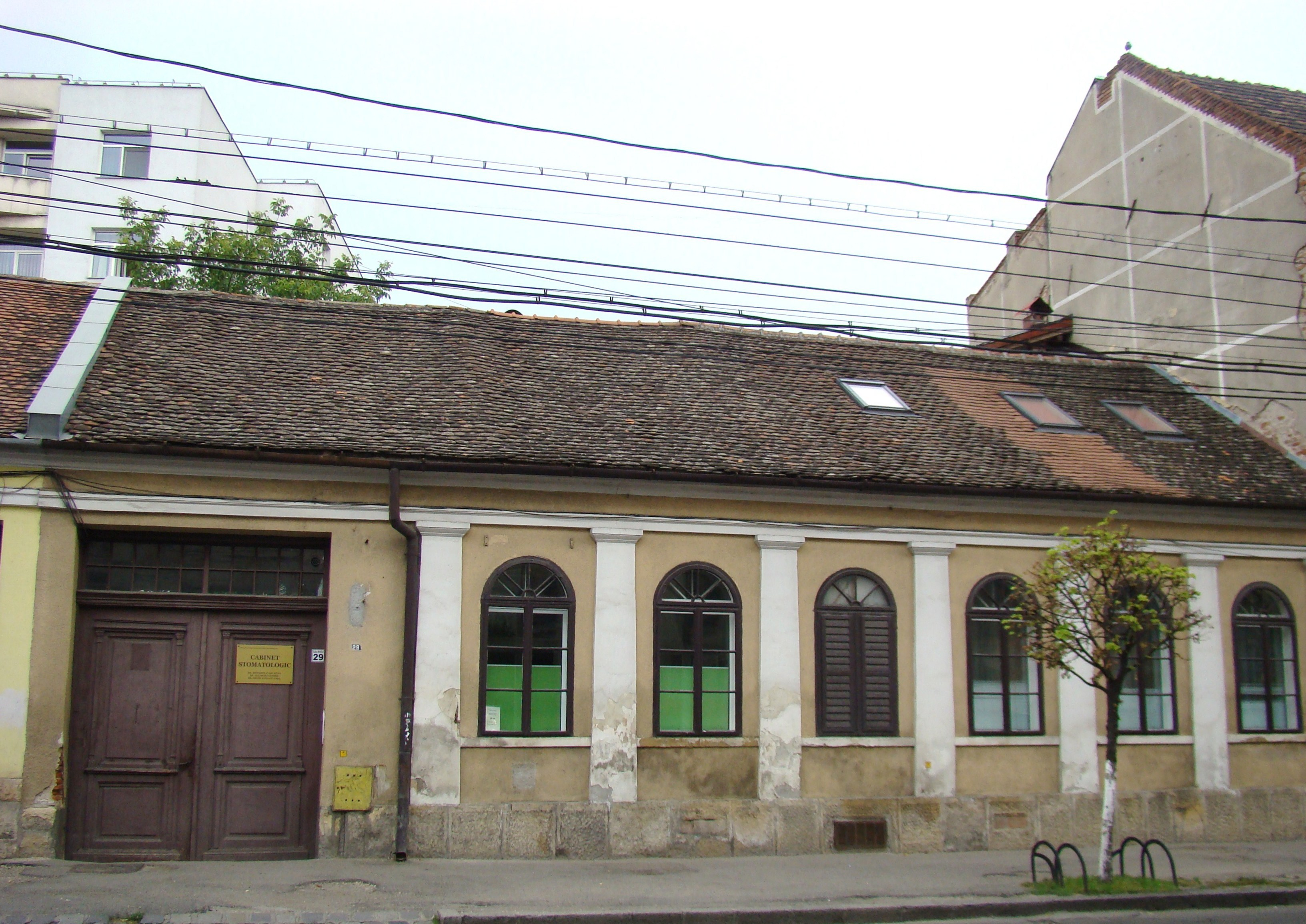 Clădire monument istoric, Calea Moților, nr. 29